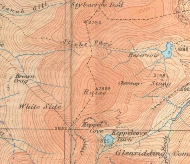 old OS map